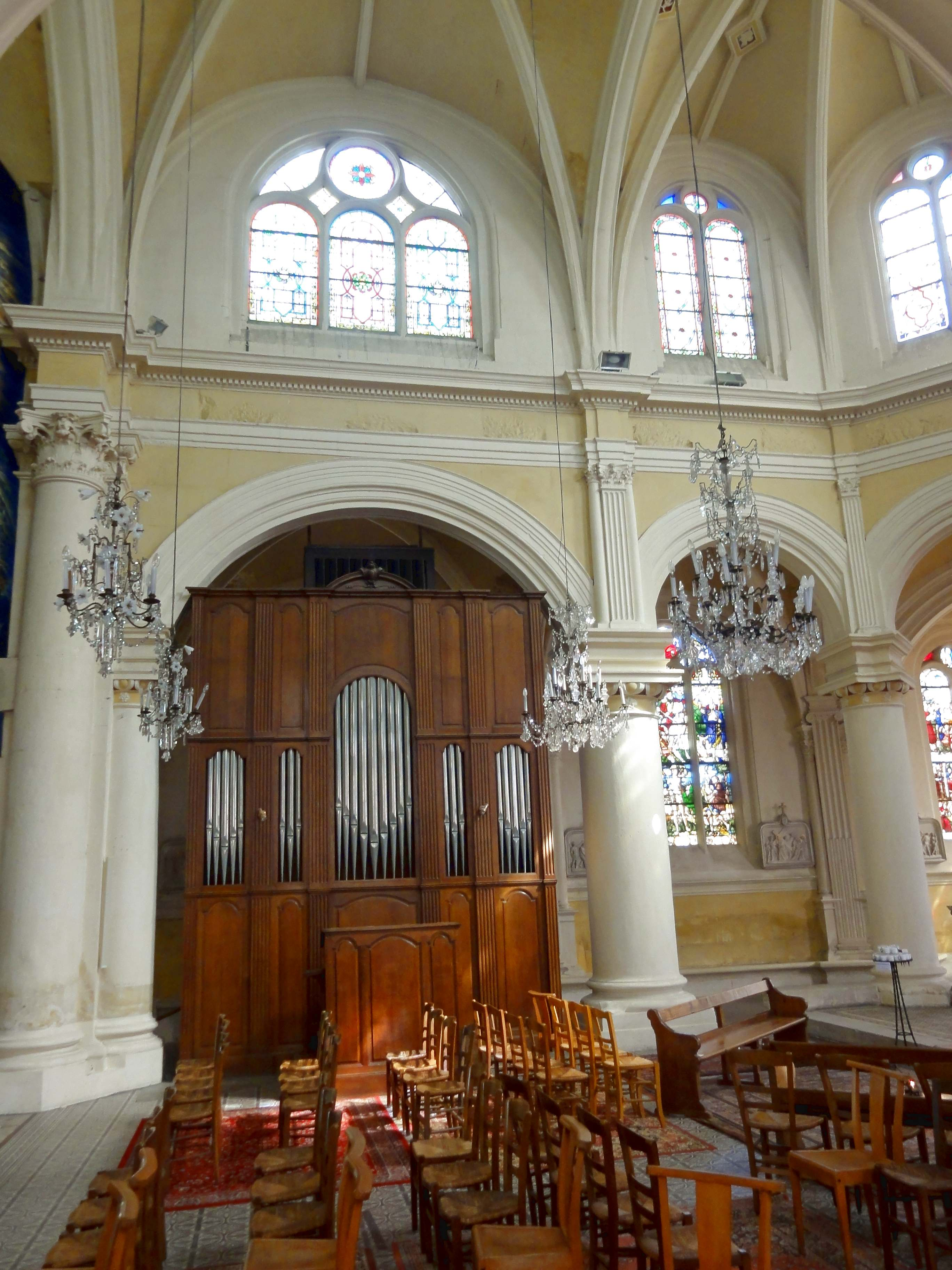 Intérieur de l'église - voir titre.